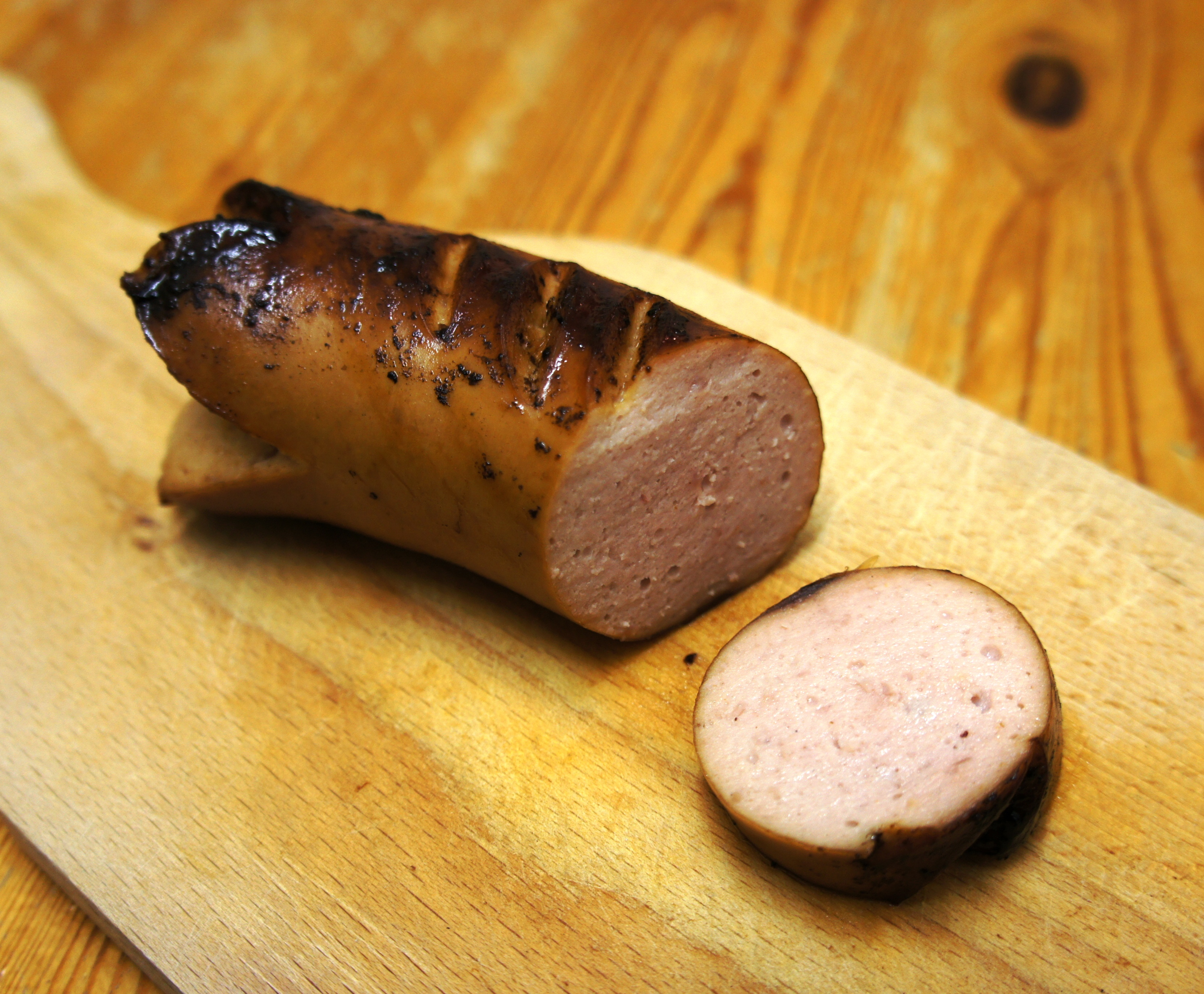 Ein gebratener Cervelat angeschnitten auf einem Holzbrettchen.